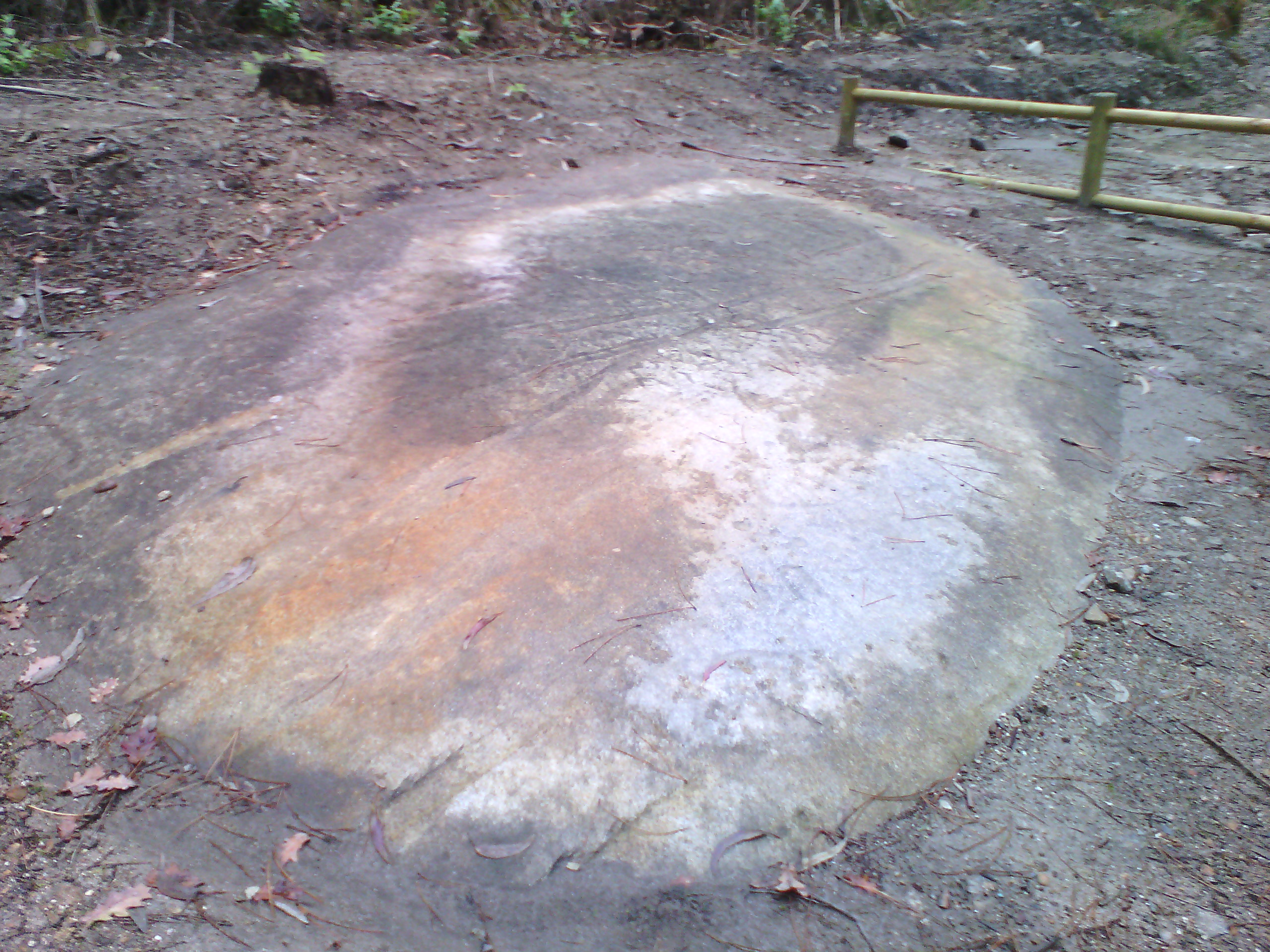 Petróglifo de Chan dos Areeiros, entre os lugares de Areeiros (Santa Cristina de Cobres) e Acuña (Vilaboa), no concello de Vilaboa.